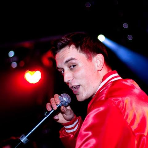 Capey auf der Bühne im Berliner Club Lido